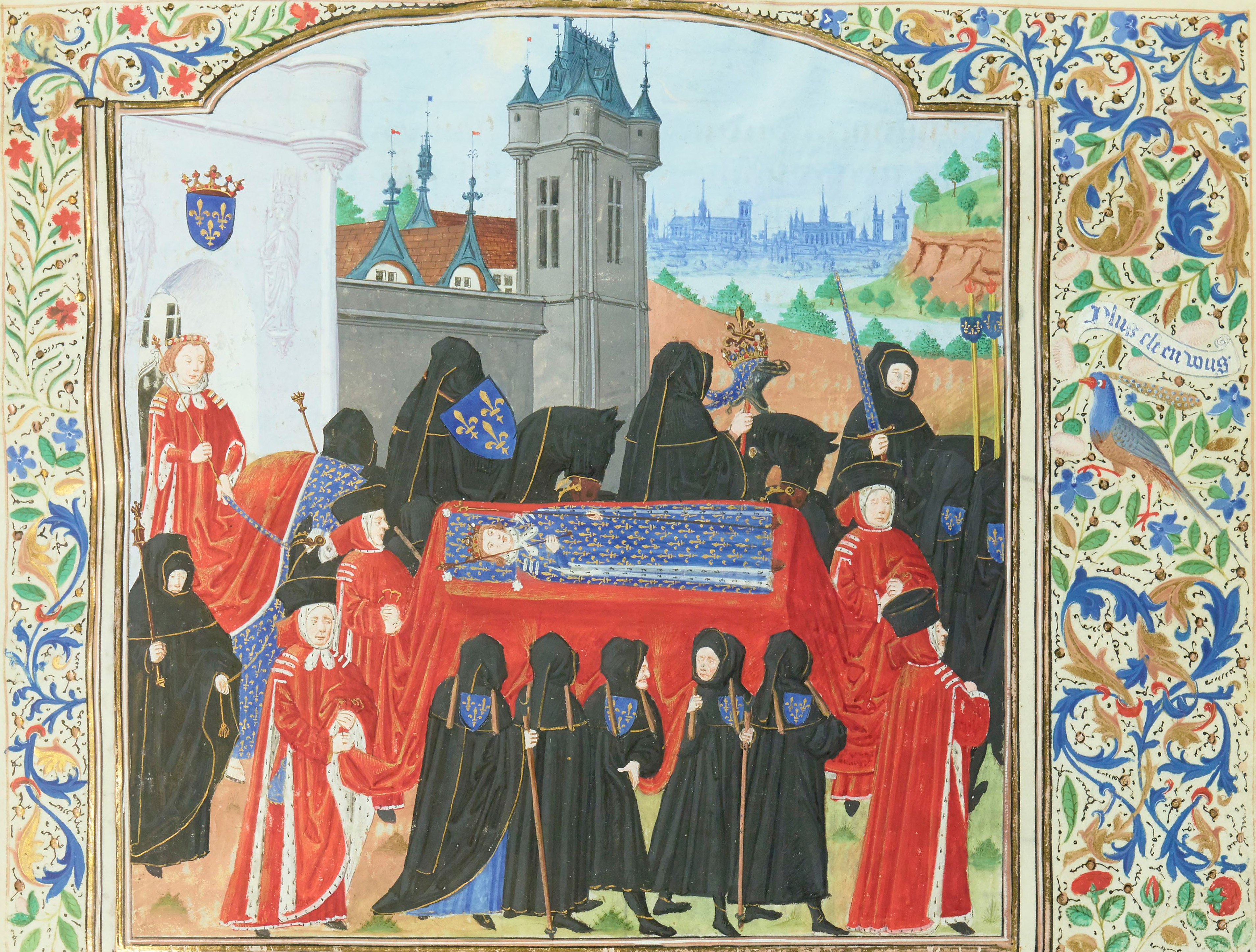 Enluminure ornant La Cronicque du temps de tres chrestien roy Charles, septisme de ce nom, roy de France par Jean Chartier, Paris, Bibliothèque nationale de France, Ms. Français 2691, folio 1 recto.